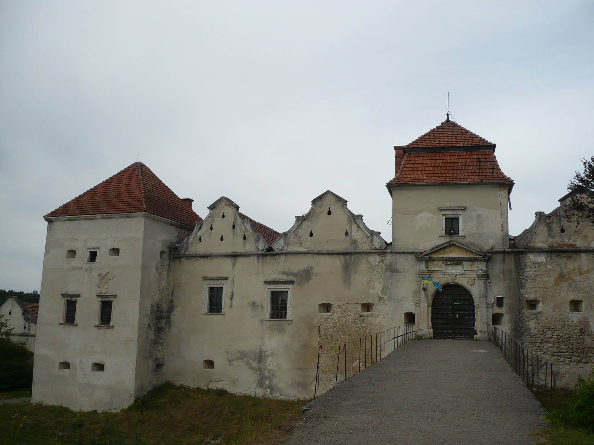 Front zamku w Świrzu na Ukrainie. Zamek stanowił pierwotnie własność książąt Świrskich, od XVII wieku należał do rodu Cetnerów, zniszczony podczas wojen kozackich w 1648, zdobyty przez Turków w 1672. Po pierwszym rozbiorze Rzeczypospolitej znalazł się na obszarze zaboru austriackiego. Ostatnimi właścicielami przed 1939 byli Irena z Lamezanów i jej mąż Tadeusz Komorowski, późniejszy dowódca Armii Krajowej i powstania warszawskiego